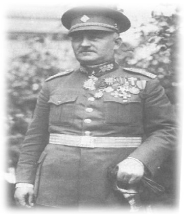 Divizní generál Josef Kroutil ve slavnostní uniformě. Jedná se o slavného legionáře a hrdinu naší země.